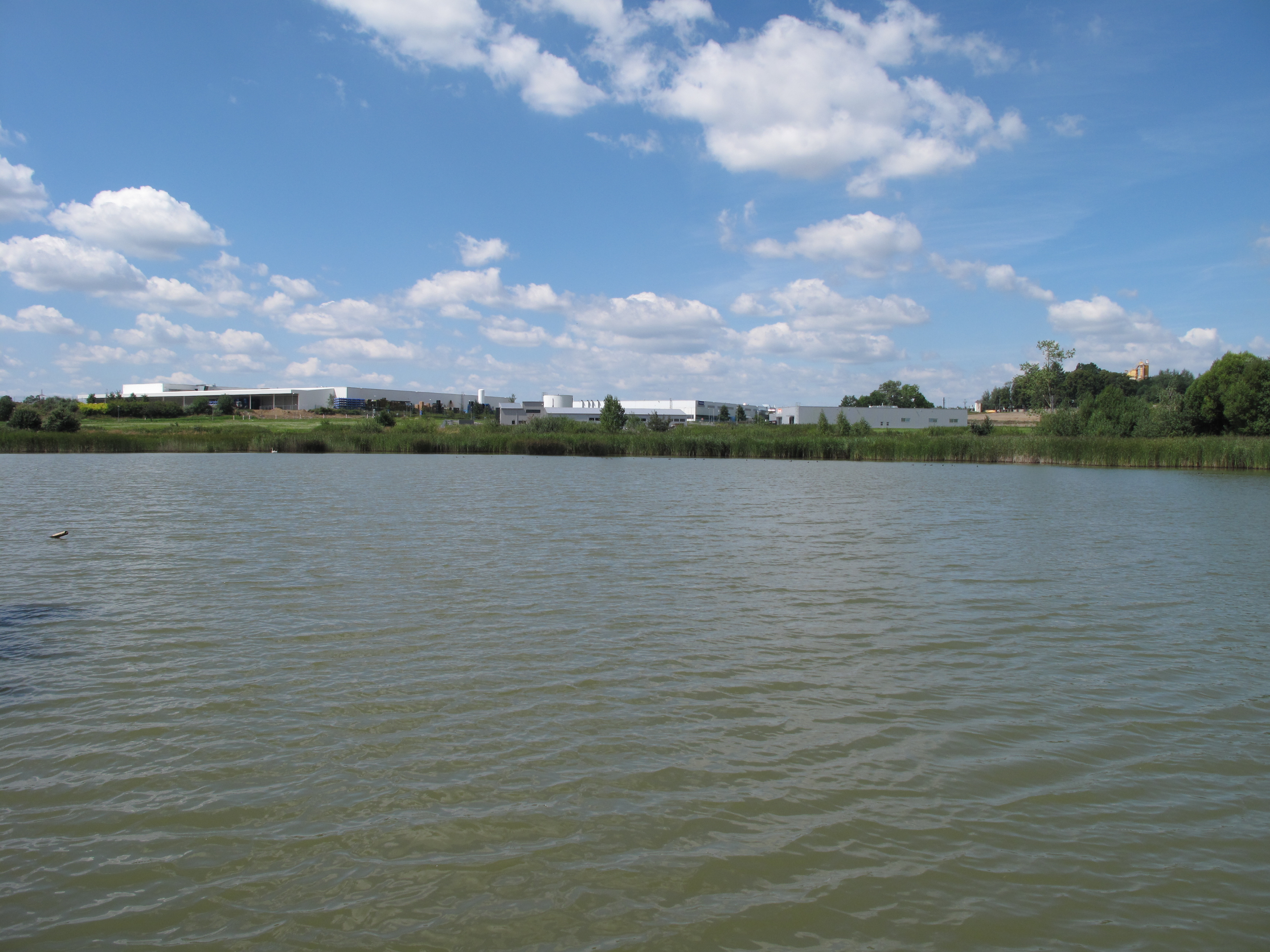 Bažný rybník. Okres Písek, Česká republika.